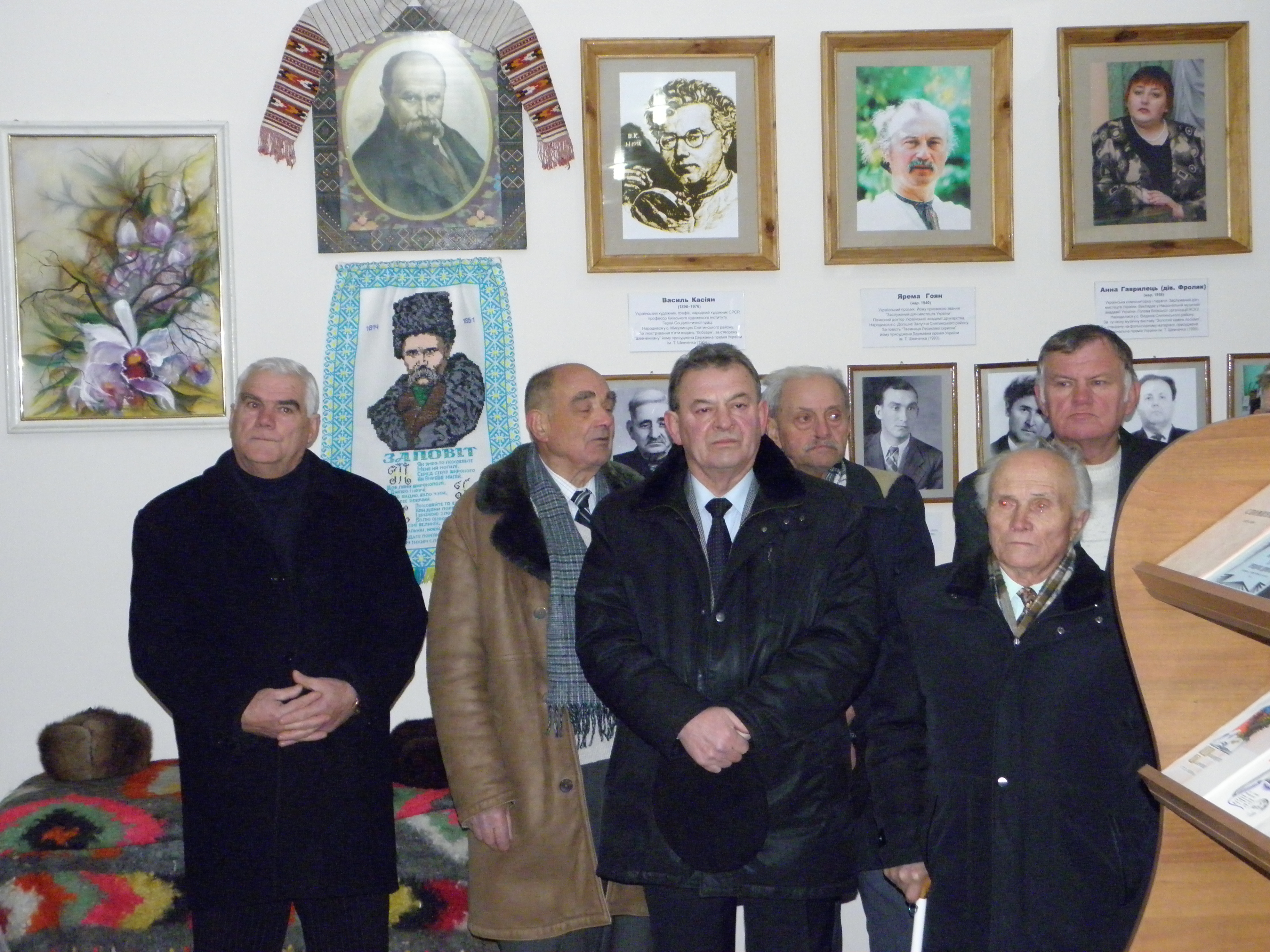 Представники влади і громадськості